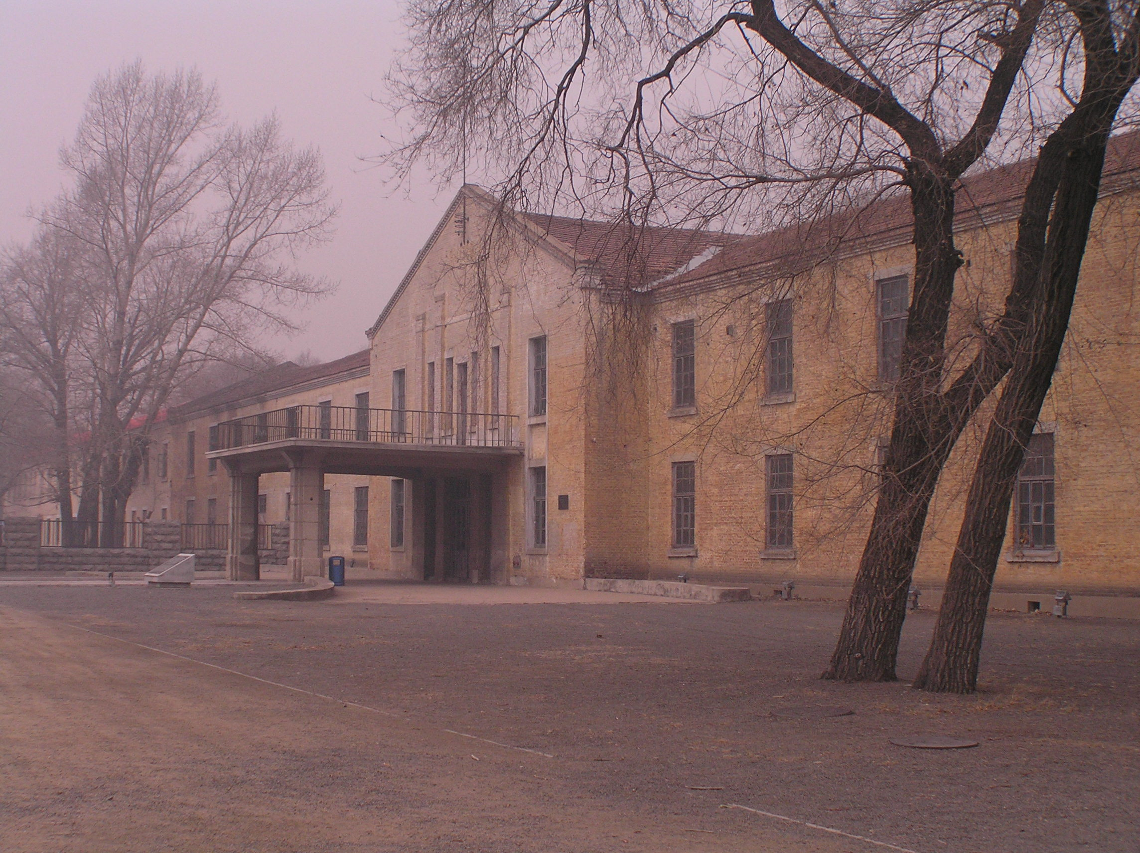 Building on the site of the Harbin bioweapon facility of Unit 731 関東軍防疫給水部本部731部隊（石井部隊） 日軍第731部隊旧址